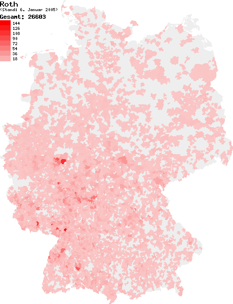 Verteilung des Nachnamens Roth in Deutschland nach dem Telefonbuch mit Stand vom 6. Januar 2005